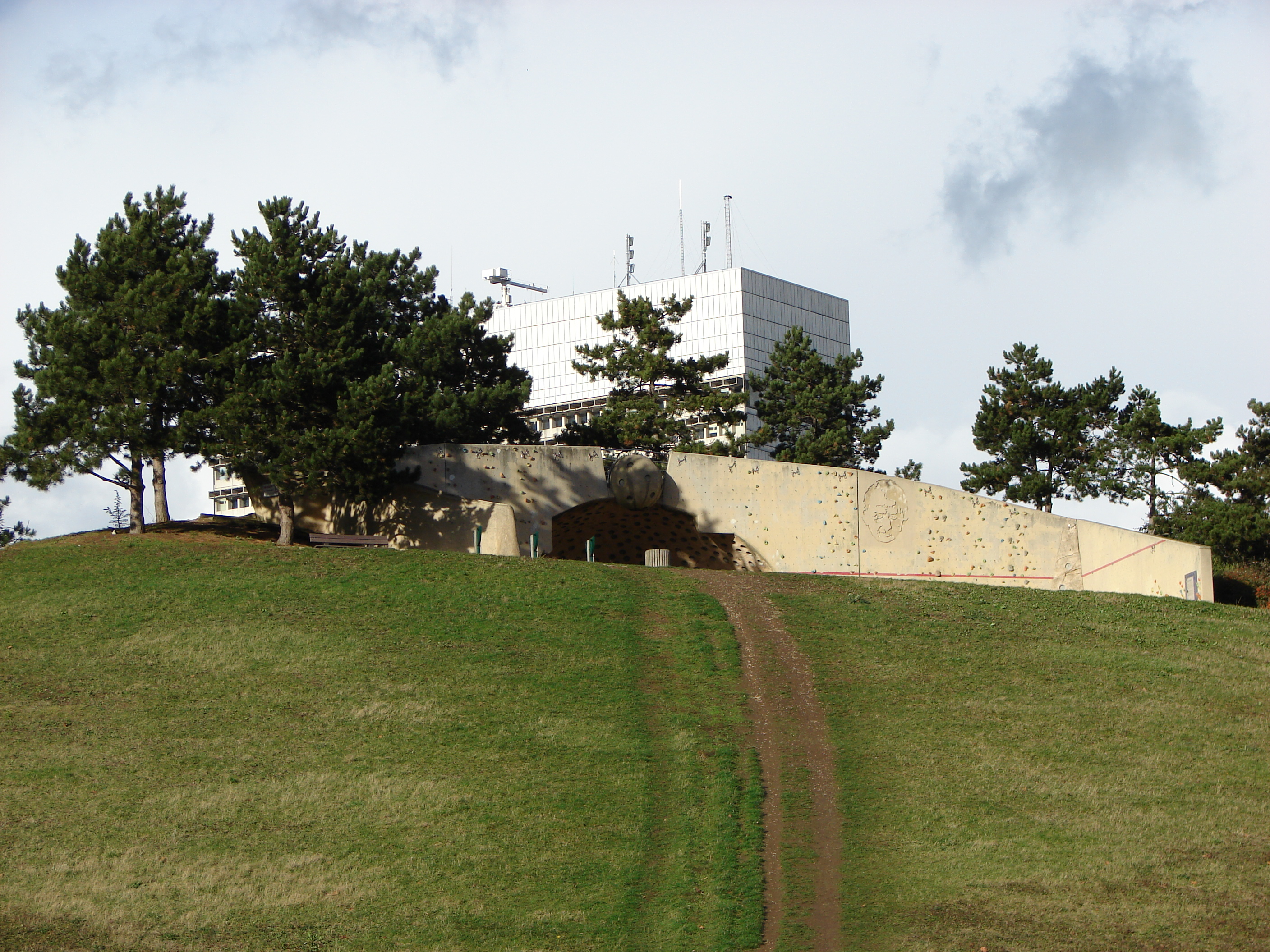 Mur d'escalade et piste de descente VTT au Parc départemental André-Malraux à Nanterre avec la Préfecture des Hauts-de-Seine en arrière plan.